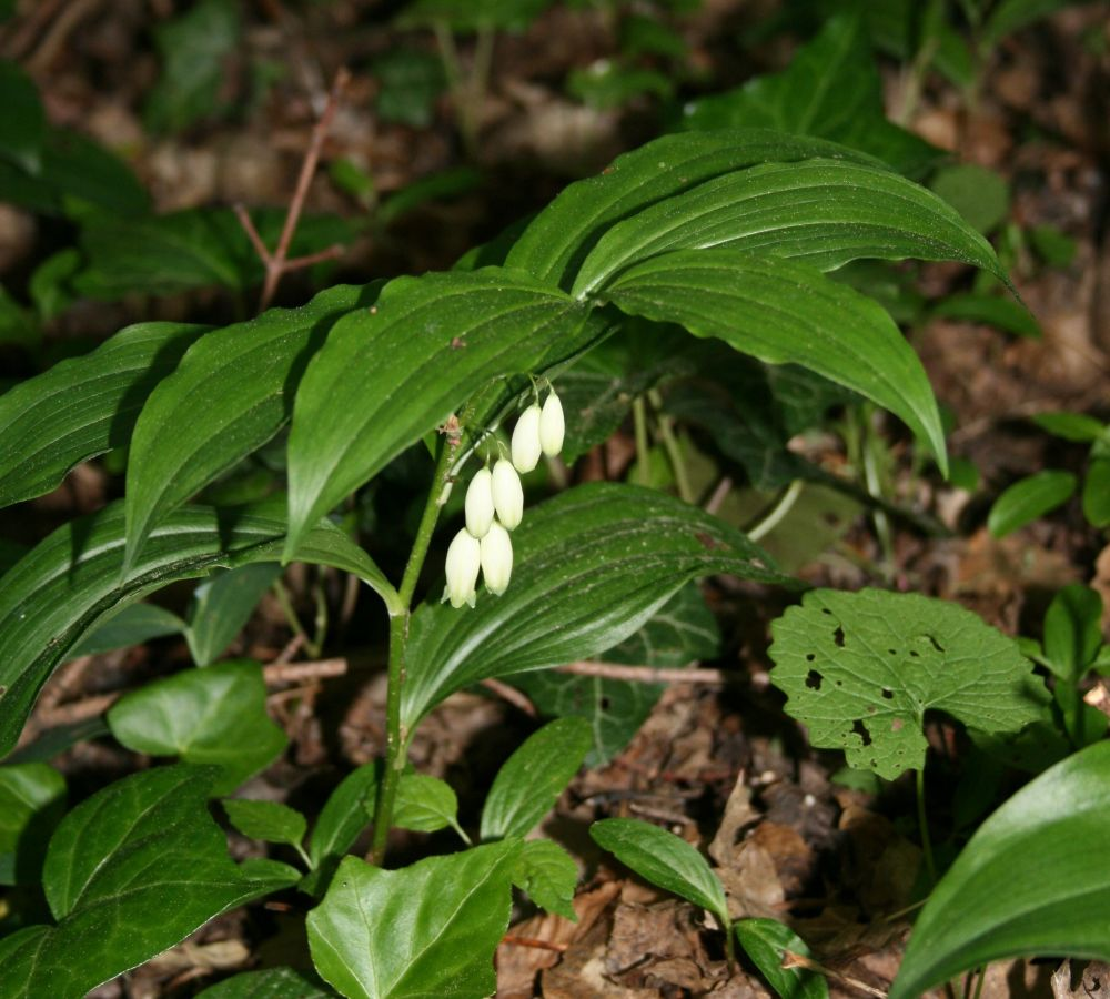 Breitblatt-Weißwurz (Polygonatum latifolium), Mäusedorngewächse (Ruscaceae) - Österreich/Austria/Autriche: Wien, Schönbrunn